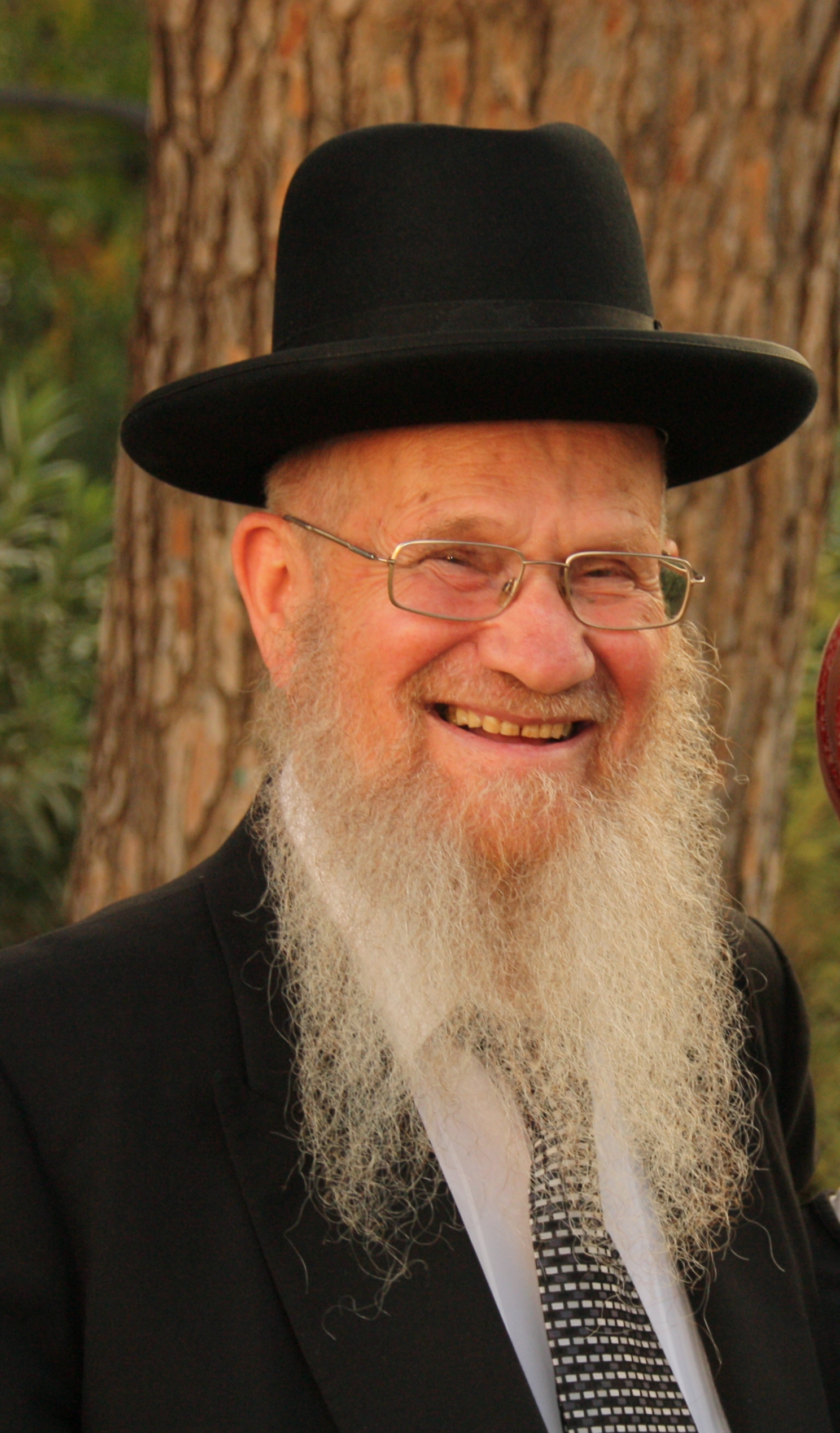 הרב חיים ישעיהו הדרי